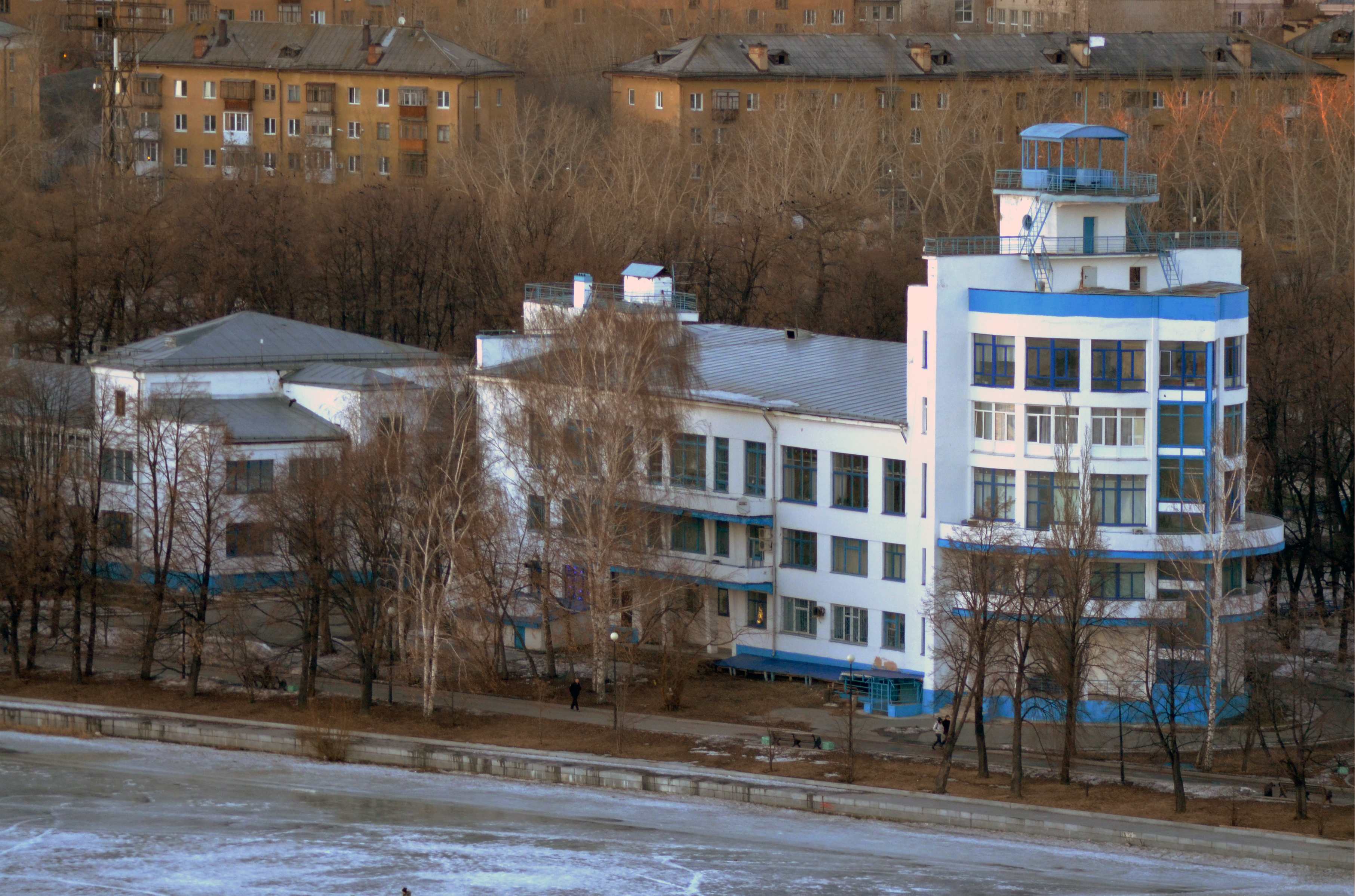 спортивный комплекс "Динамо": улица Еремина, 12, Екатеринбург, Свердловская область